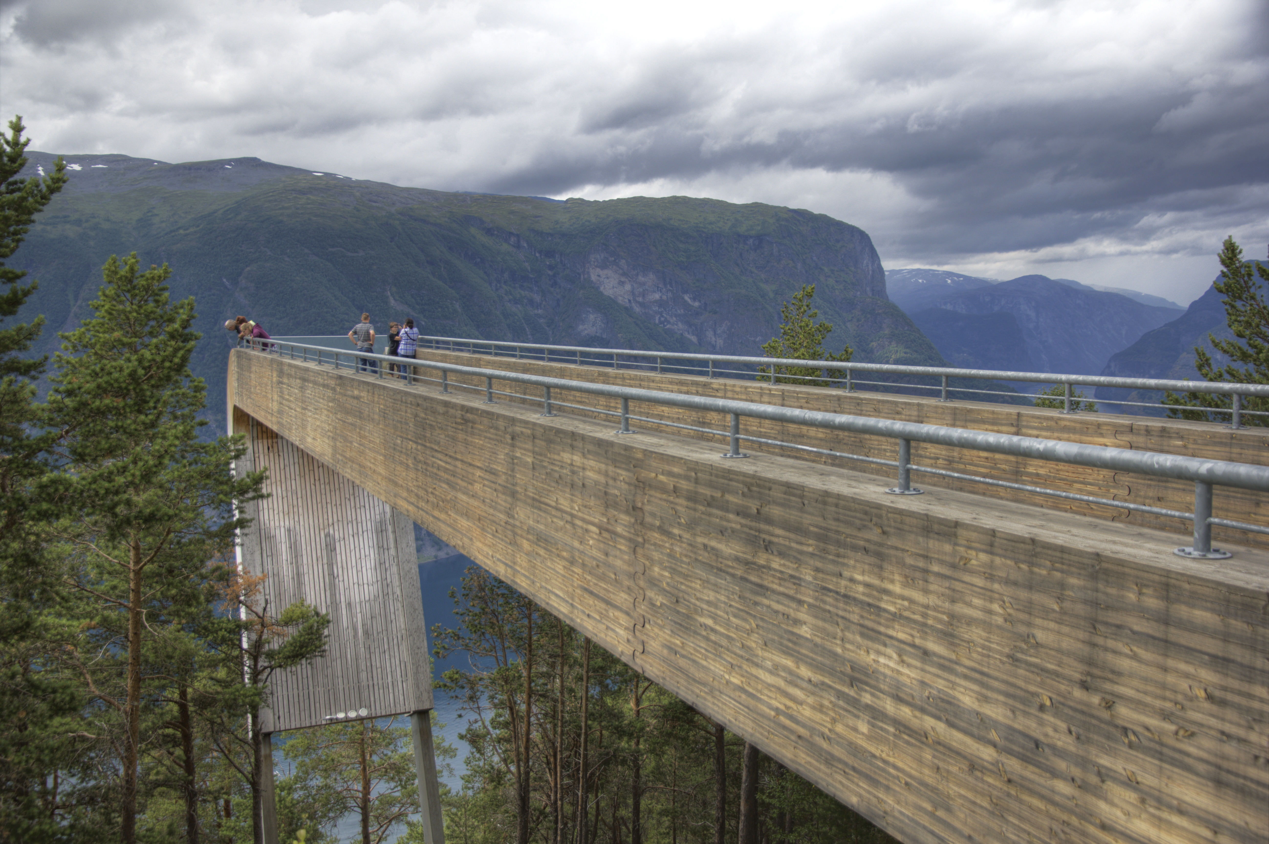 Stegastein viewpoint